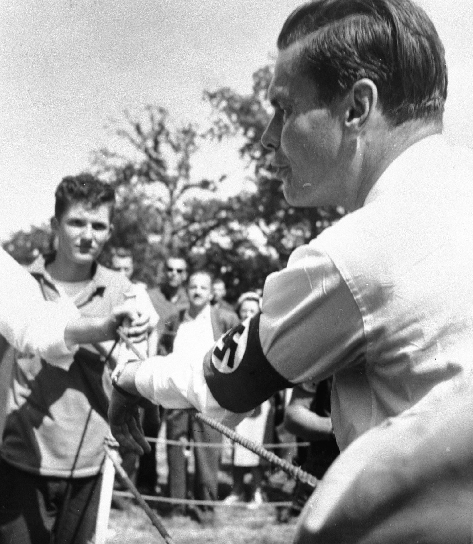 Collectie / Archief : Fotocollectie Anefo Reportage / Serie : [ onbekend ] Beschrijving : Nazi-leider Lincoln Rockwell doodgeschoten Datum : 25 augustus 1967 Fotograaf : Fotograaf Onbekend / Anefo Auteursrechthebbende : Nationaal Archief Materiaalsoort : Negatief (zwart/wit) Nummer archiefinventaris : bekijk toegang 2.24.01.04 Bestanddeelnummer : 920-6389